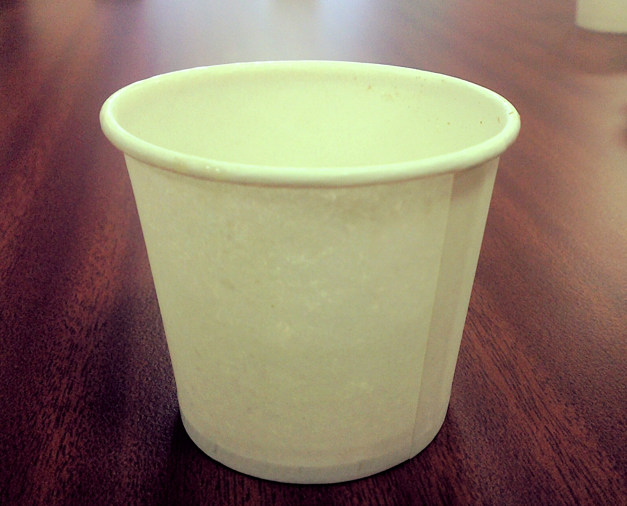 paper cup